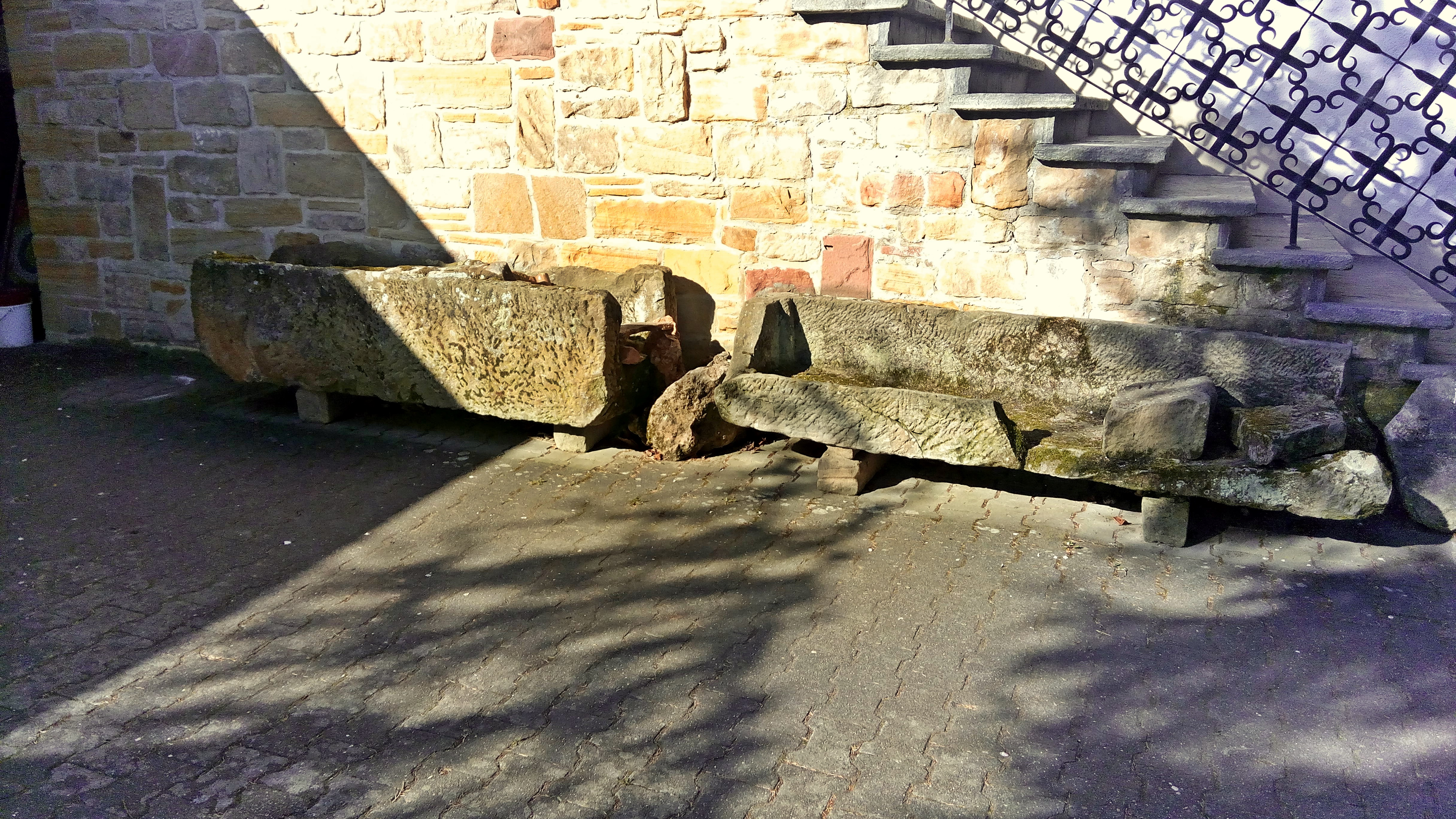 Pfeffingen, Steinsärge im Hof des Herrenhauses (Weingut Eymael)